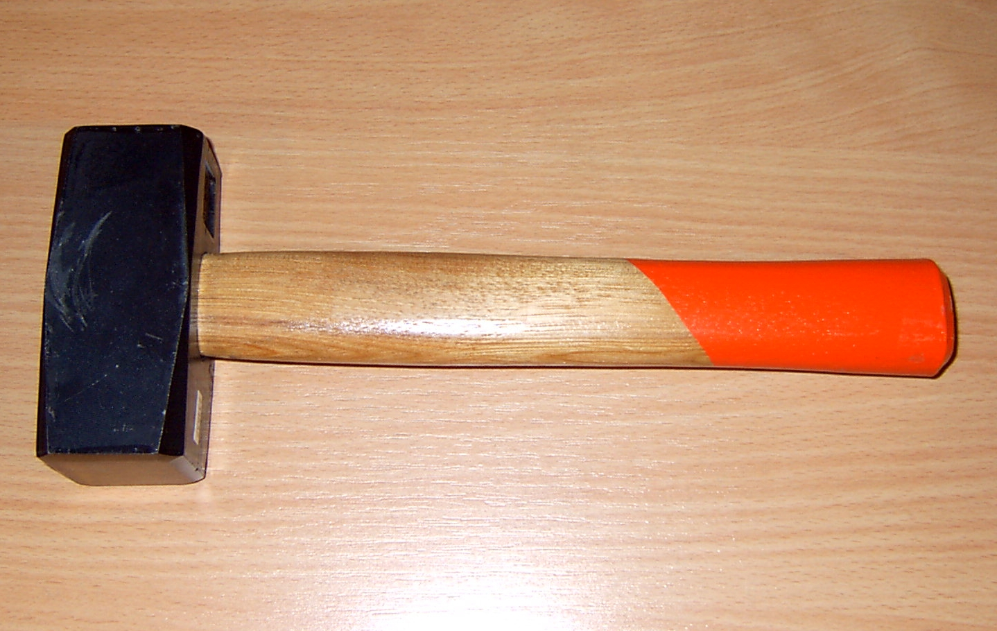 Amtlicher Merkbefreiungshammer zur Benutzung durch gunny